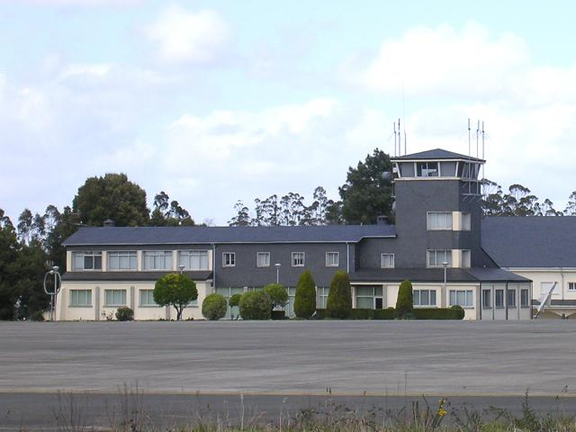 Edificio terminal del aeródromo militar del aeropuerto de Santiago de Compostela